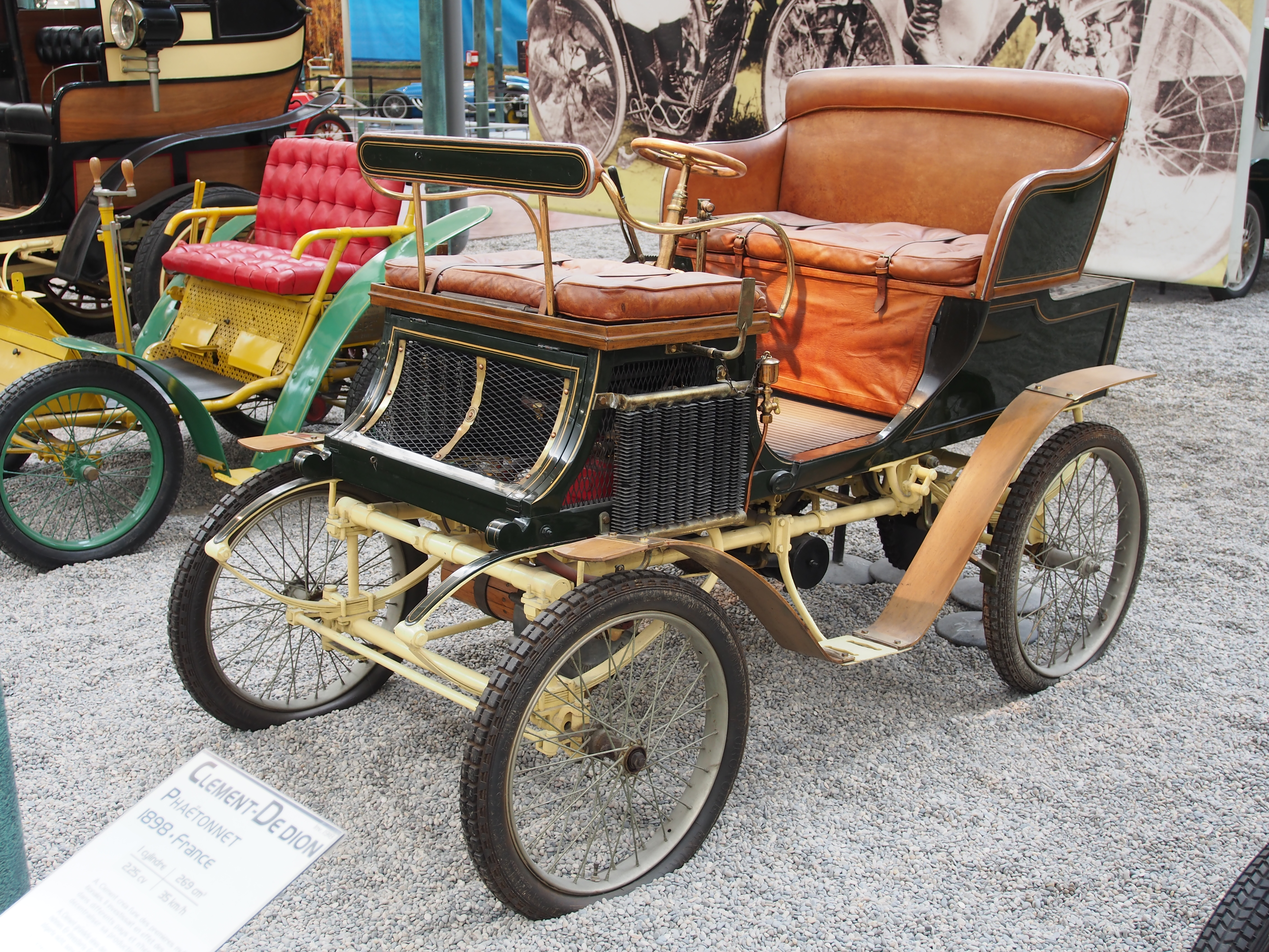 1900 Barré Vis-à-vis. Photographed at the Cité de l'Automobile, France. (The car's museum placard misdates it; see Category:1900 Barré Vis-à-vis in the Musée National de l'Automobile for details.)